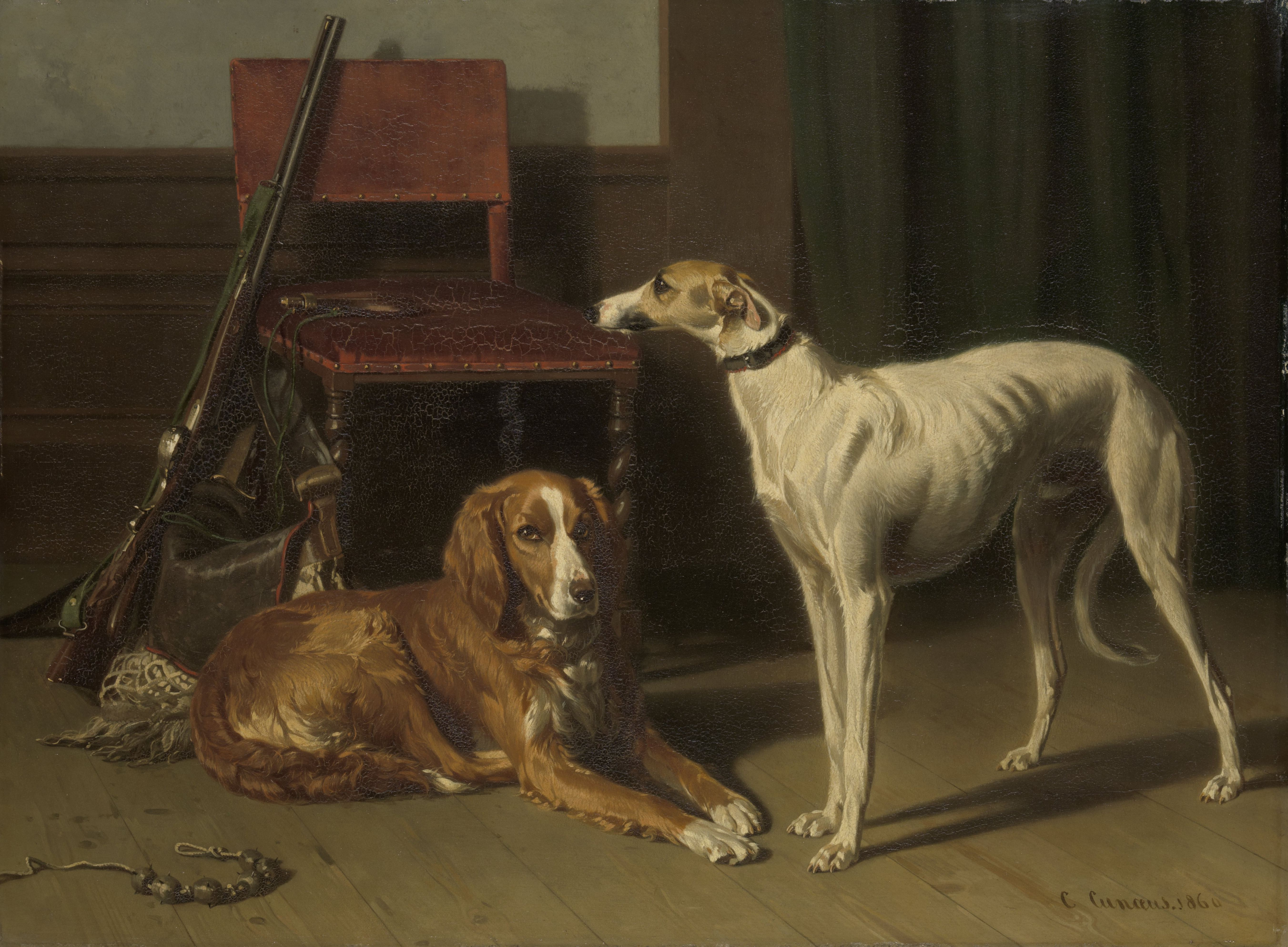 Jachtgezellen: twee jachthonden bij een stoel waartegen een jachtgeweer en weitas staan.